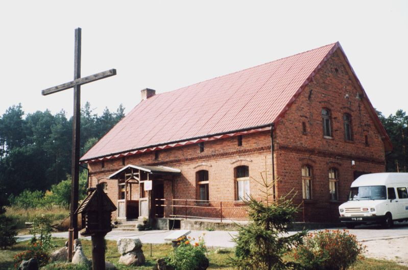 Warsztat Terapii Zajęciowej "Karczemka" w Otłoczynie. Budynek karczmy z połowy XIX wieku. Autor zdjęcia Jacek Krzyżynski Otłoczyn